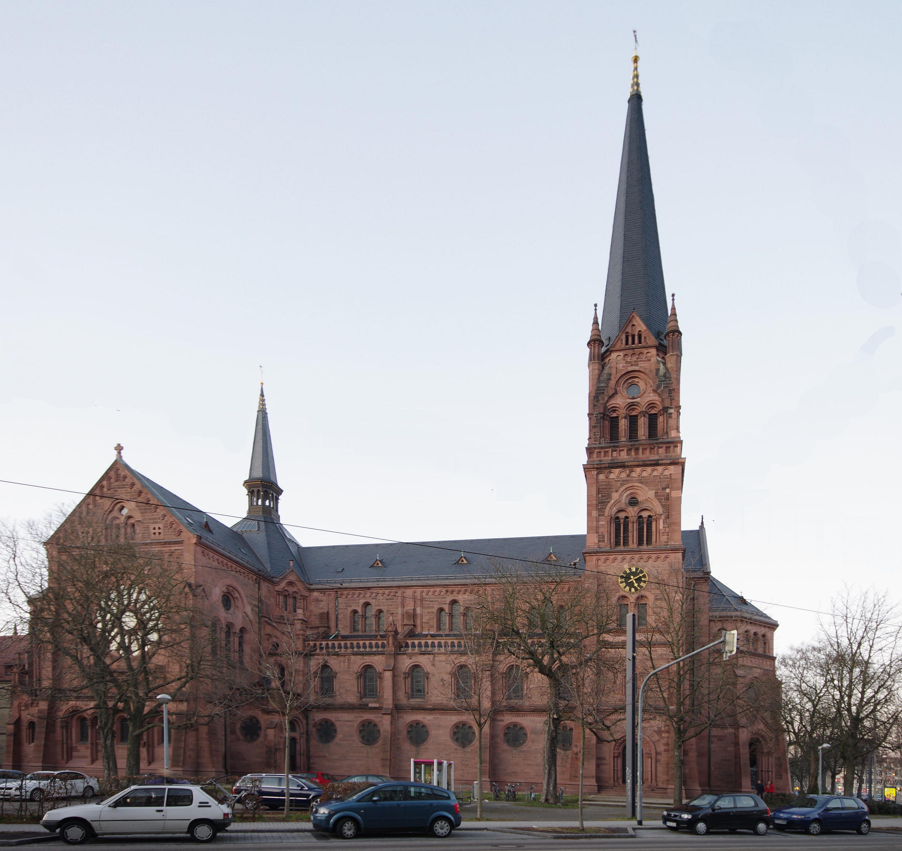 Die Johanniskirche in Freiburg